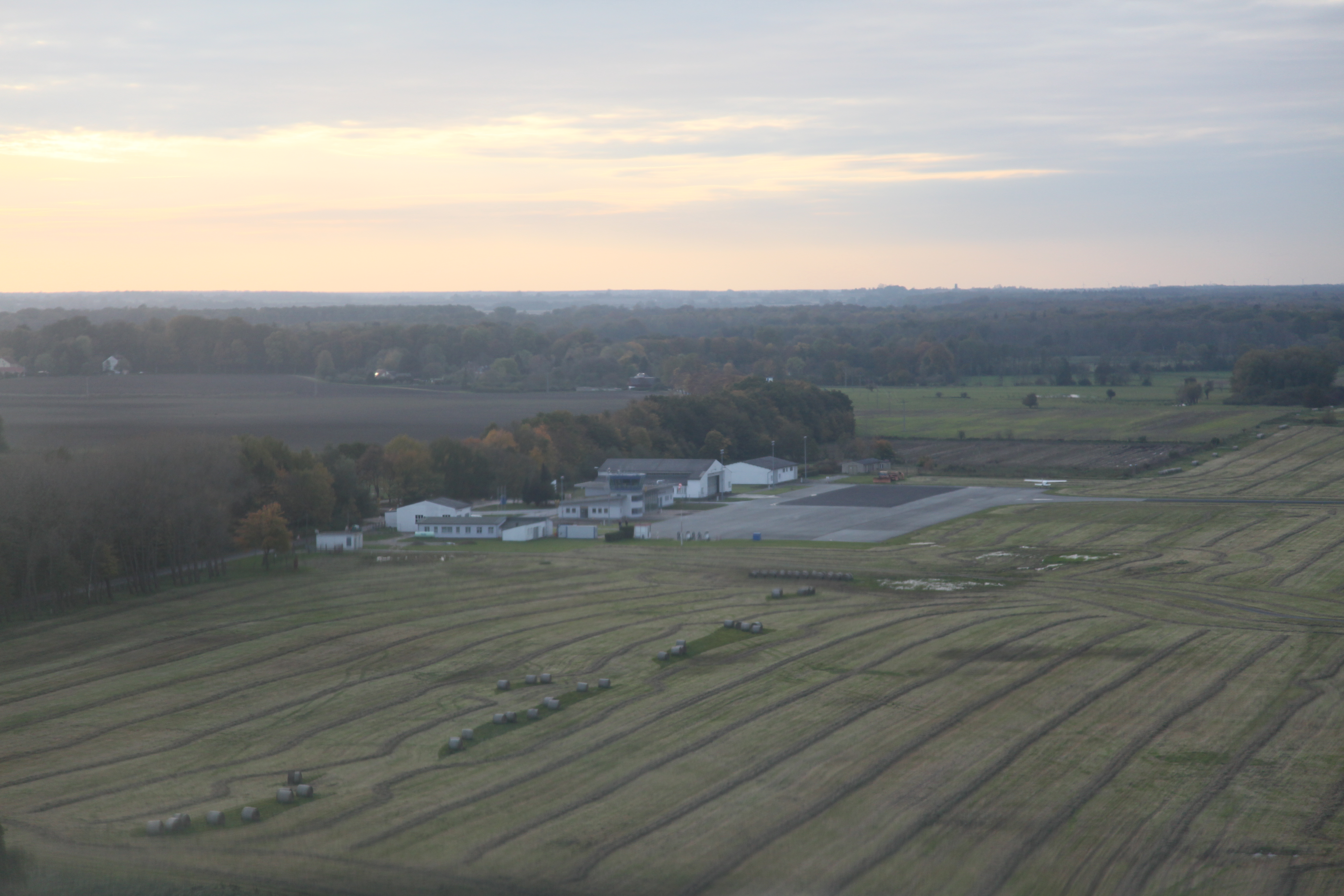 Flughafen Barth mit neuer Abflughalle, aufgenommen aus der Luft.